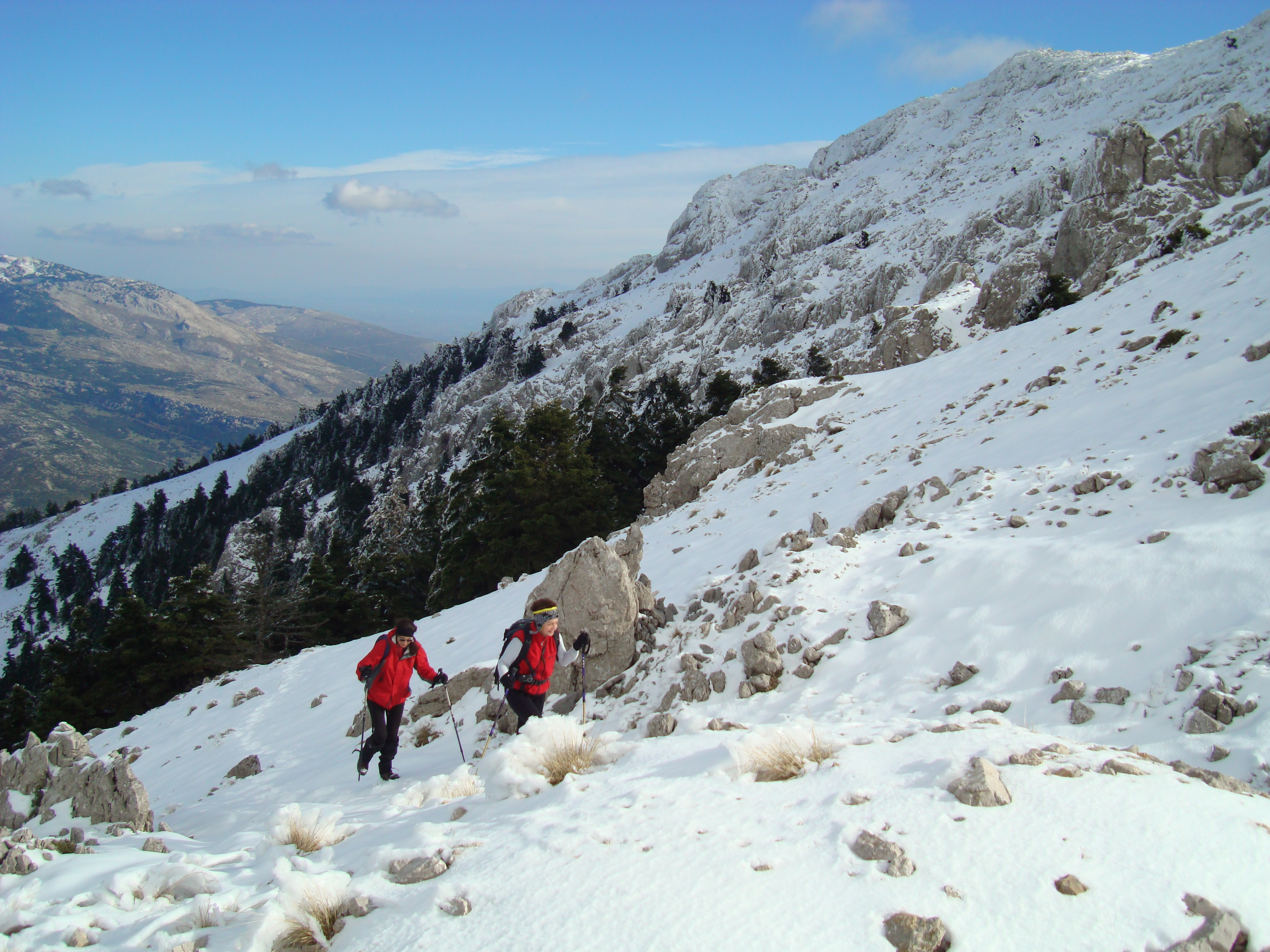 Ascent on Mountain Helikon